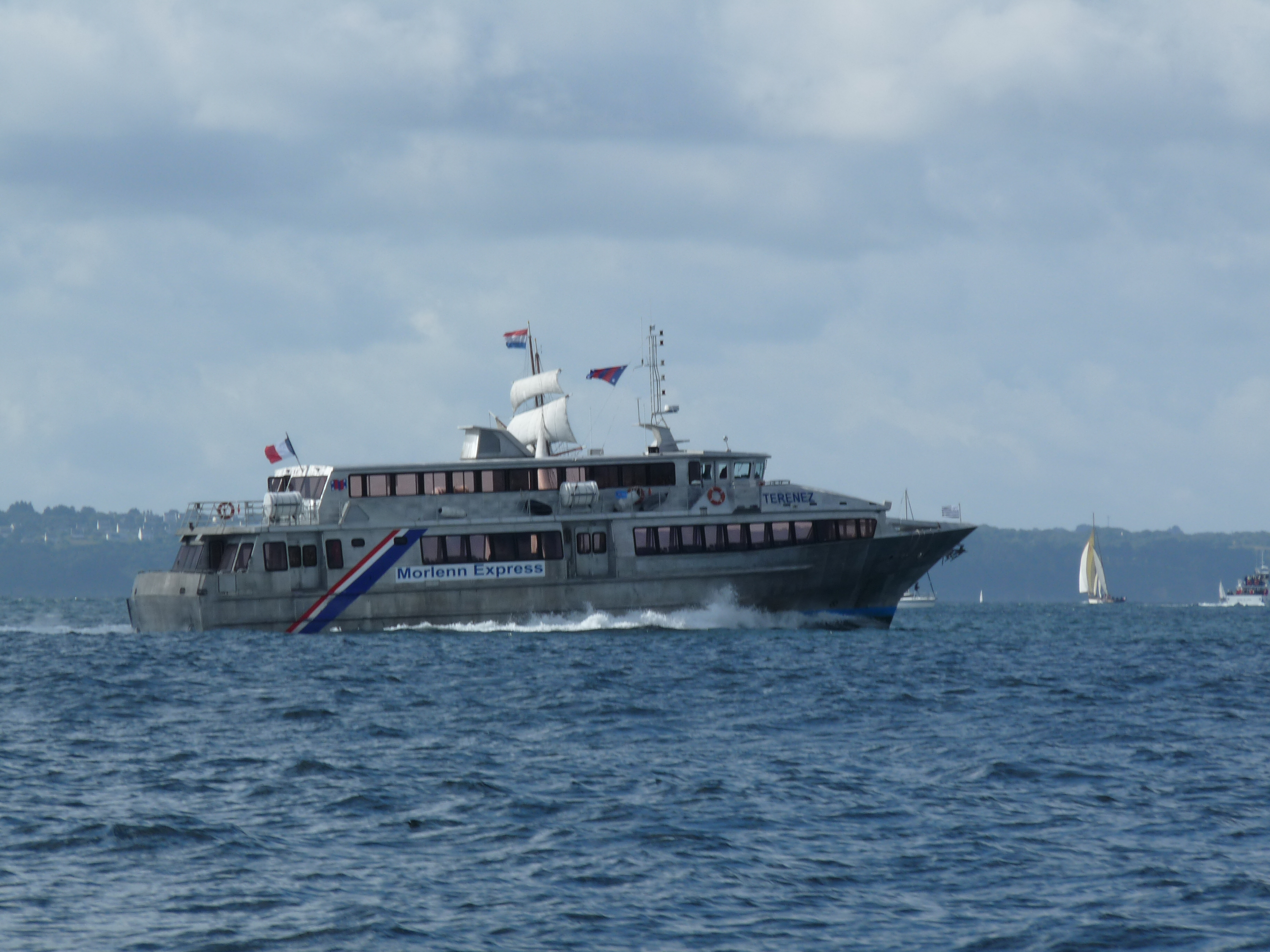 Les Tonnerres de Brest 2012 : La vedette Térénez de la Morlenn Express à toute vitesse dans la rade